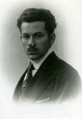 Portraitaufnahme von Otto Renois (1892-1933), Schreiner, Bonner Stadtverordneter (KPD), erstes Opfer des Nationalsozialismus in Bonn.